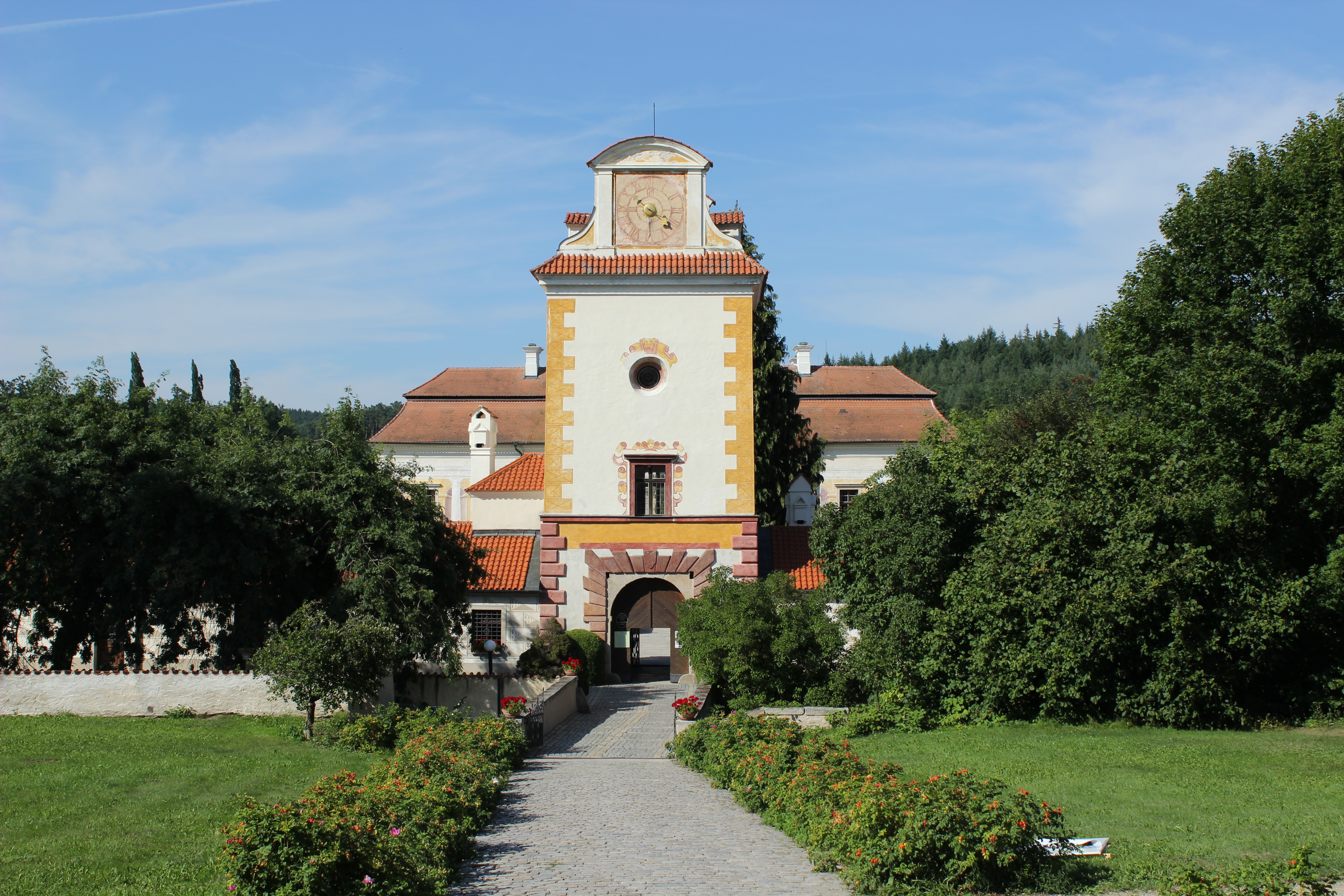 Vstupní brána do areálu zámku Kratochvíle (pohled z vnějšku areálu).